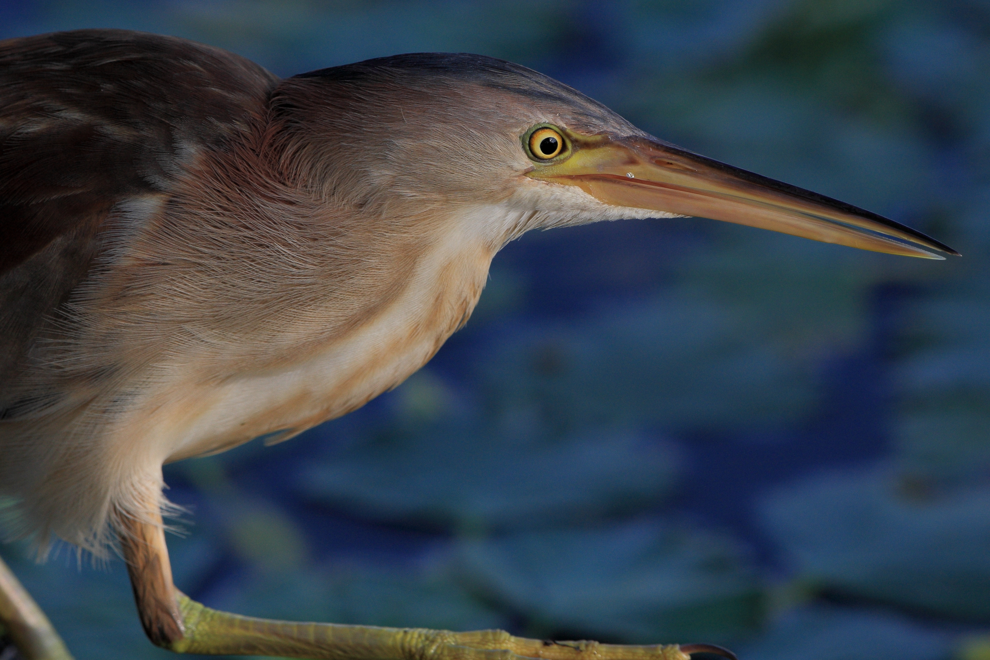 新潟県阿賀野市 瓢湖で撮影されたヨシゴイ。